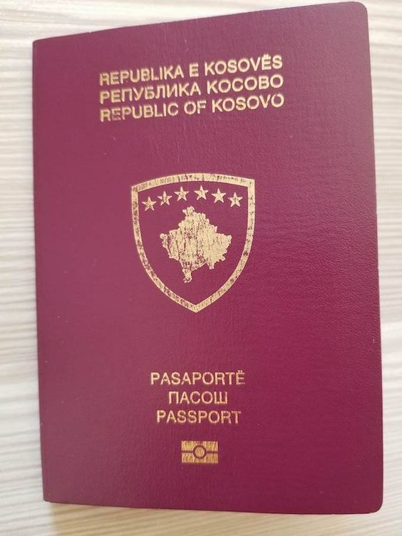 Passaporta me e re e Kosoves mbyllur.